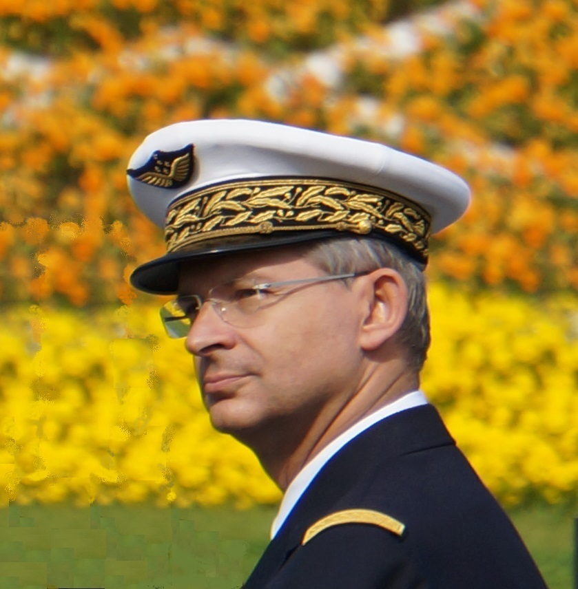 Assemblée du "Souvenir français".